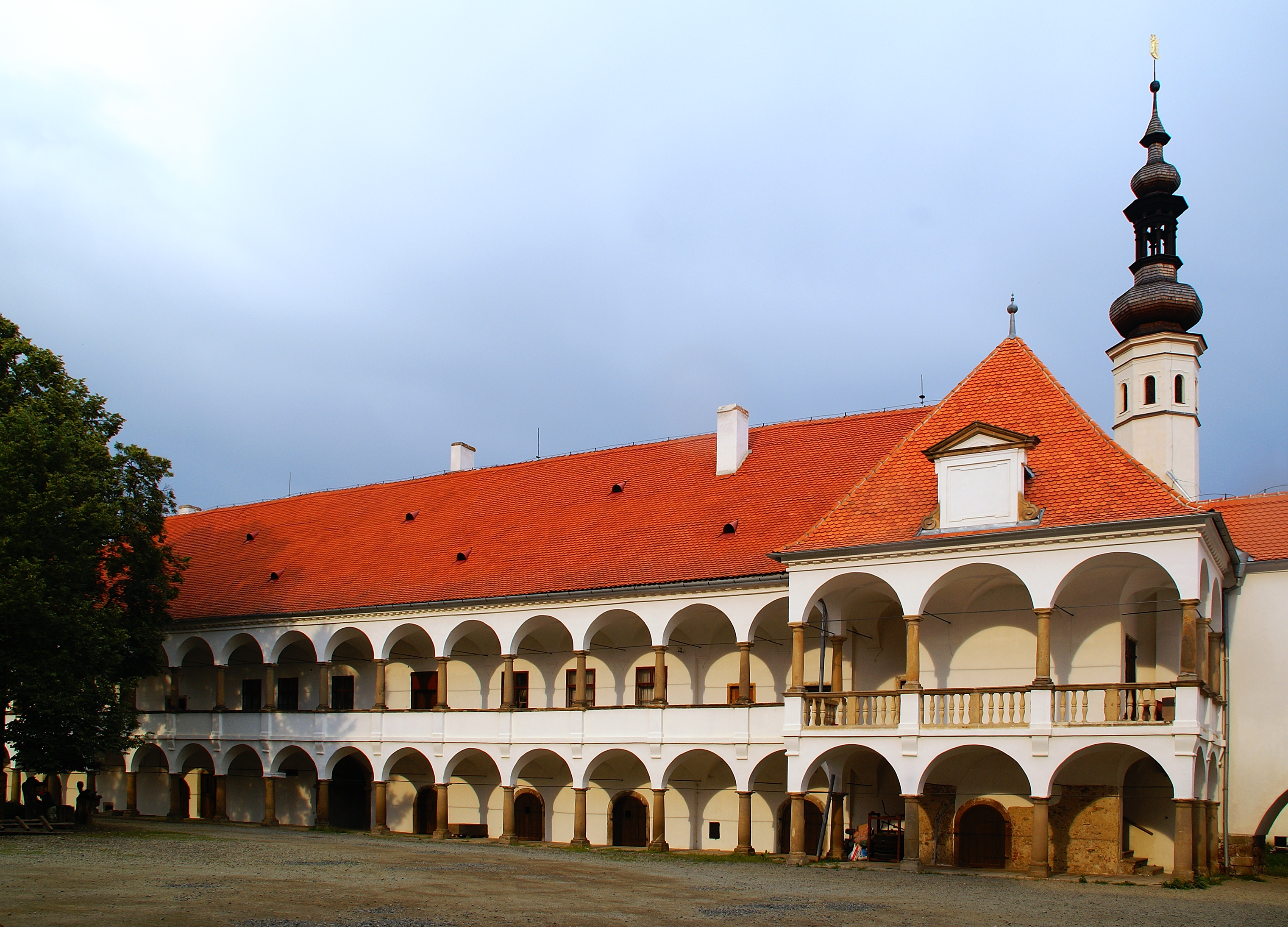 Nádvoří zámku v Oslavanech.